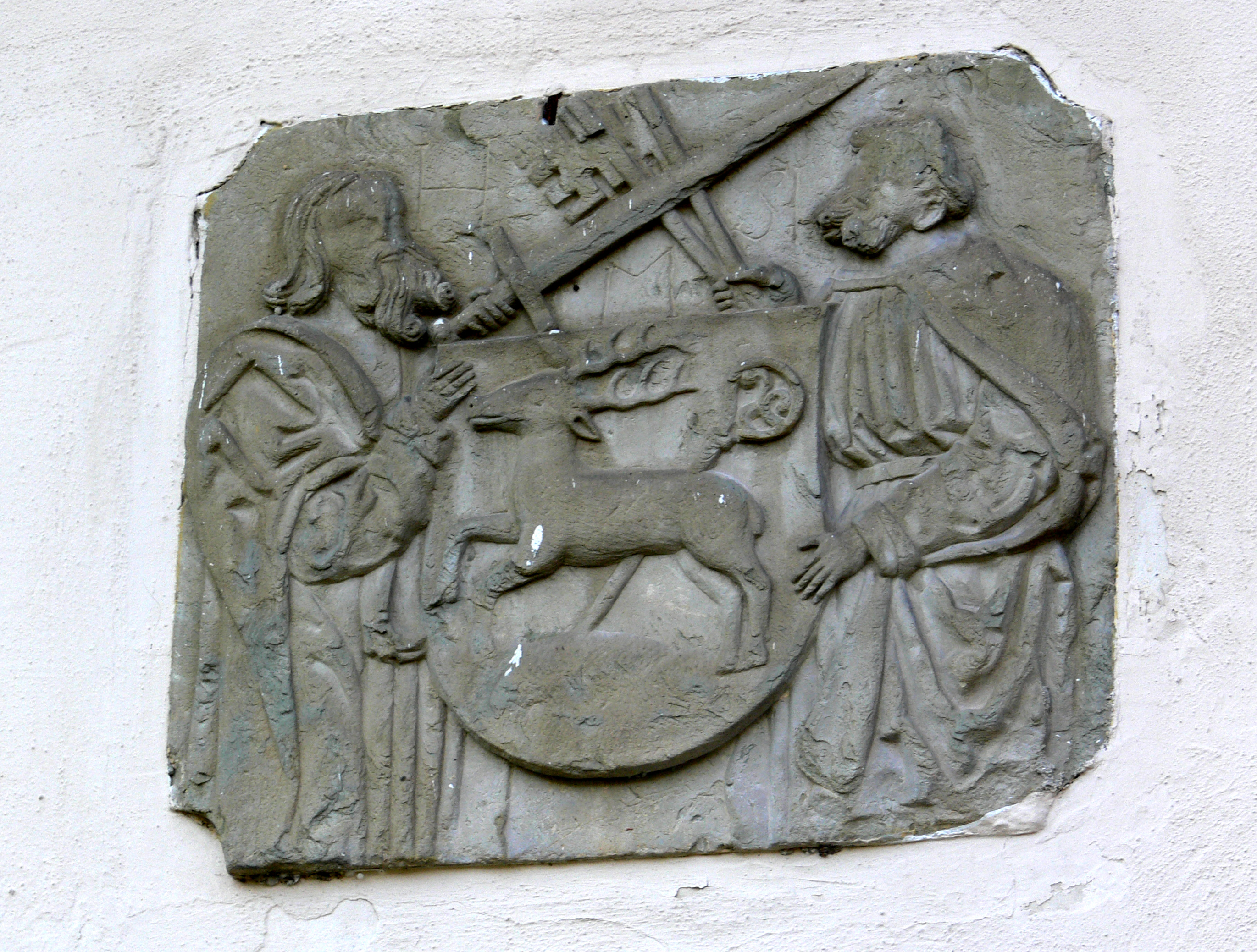 Ehem. Kloster St. Peter und Paul Hirsau, Calw: Relief mit Wappendarstellung